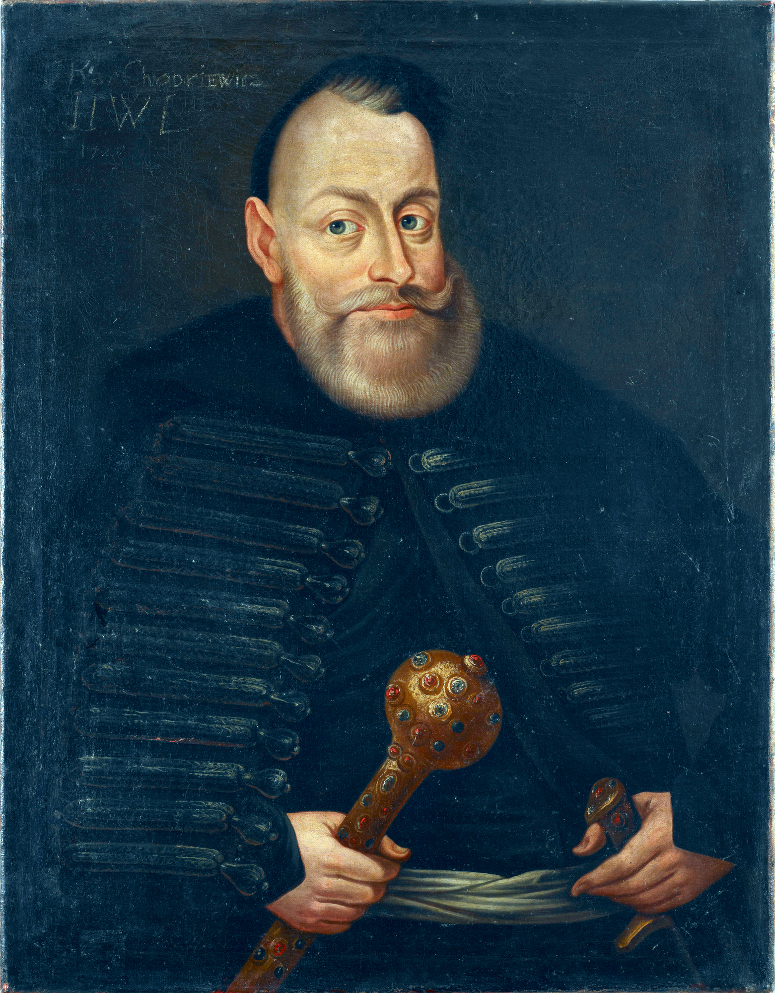 Беларуская (тарашкевіца): Партрэт Яна Караля Хадкевіча (Jan Karal Chadkievič)